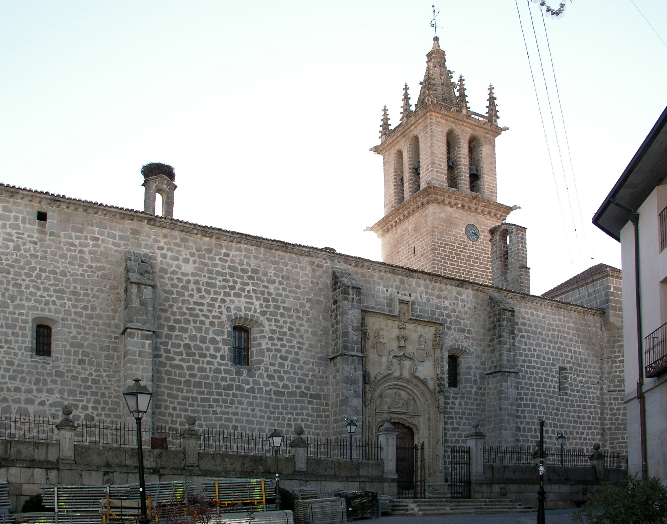 Colmenar Viejo, Madrid, Spain. Basílica de la Asunción de Nuestra Señora de Colmenar Viejo.